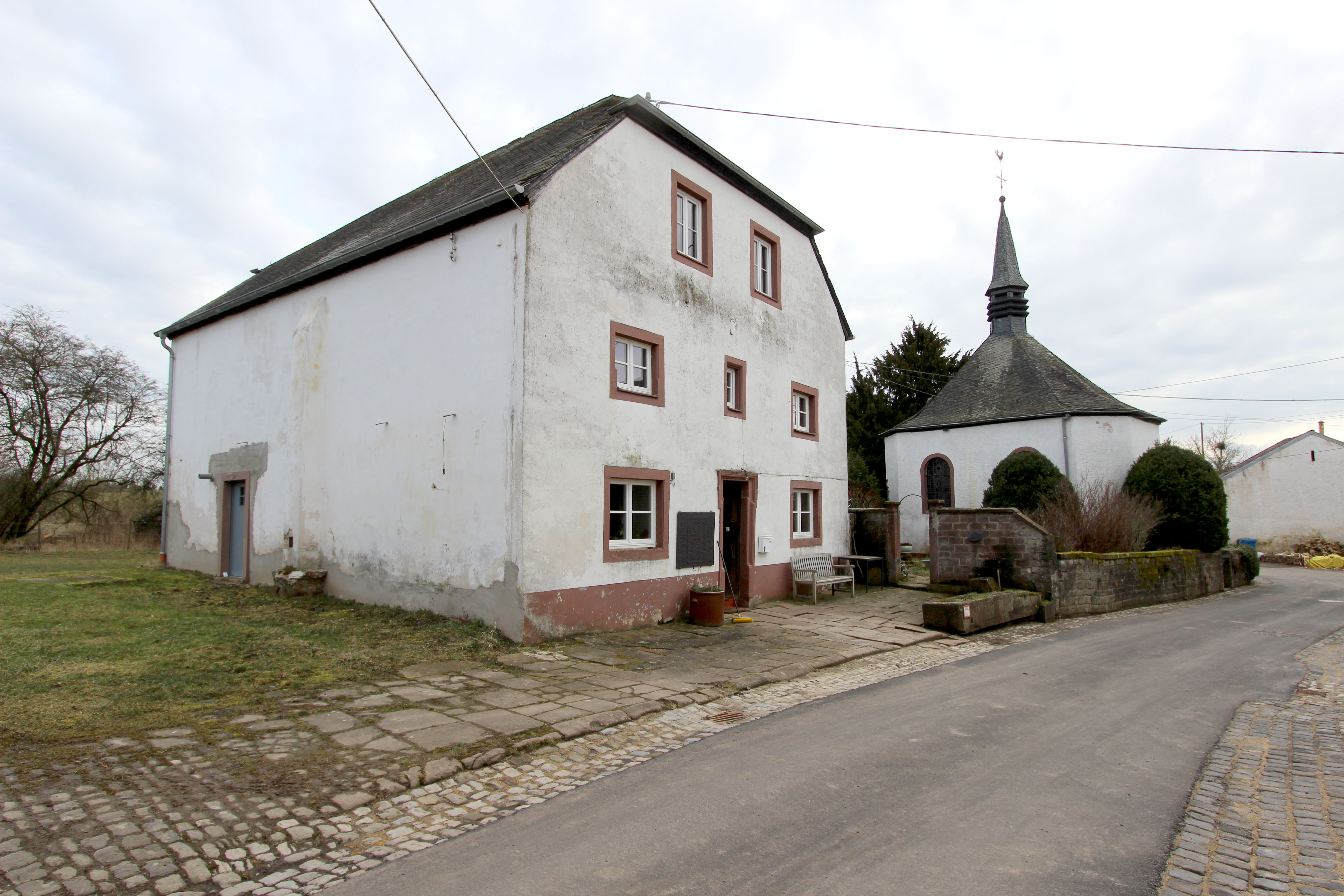 54634 Irsch. Wohnhaus, erste Hälfte des 18. Jahrhunderts, Wirtschaftstrakt bezeichnet 1728, Aufstockung nach 1945, zwei Scheunen, bezeichnet 1812 und 1858, Tor bezeichnet 1865; Nebengebäude mit Backhaus, Mitte des 19. Jahrhunderts; zugehörig Hofkapelle St. Johannes Evangelist. Aufnahme von 2018.